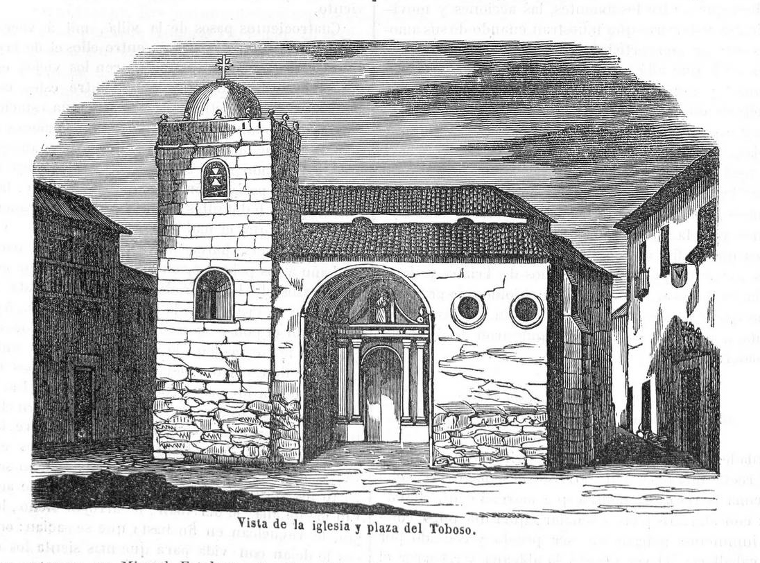 Vista de la iglesia y plaza del Toboso.